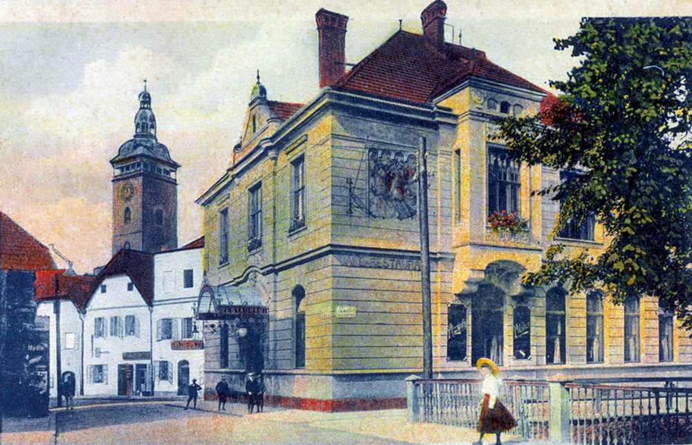 Kavárna a restaurace U Volbrechtů v roce 1906